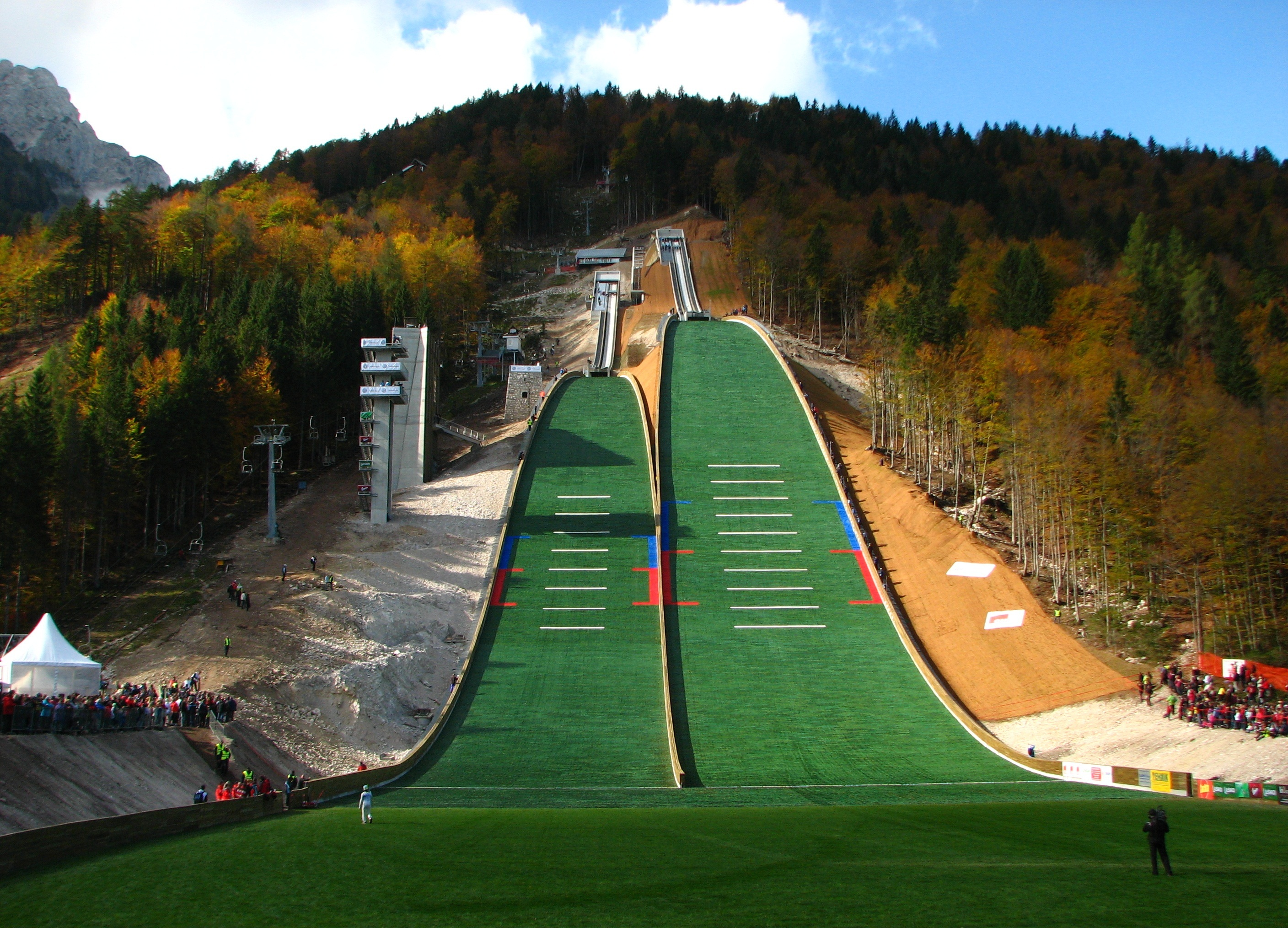 14.10.2012 je potekala otvoritev nove Bloudkove velikanke in nove srednje skakalnice v Planici. Prvi zmagovalec in novi državni prvak je postal Jurij Tepeš.